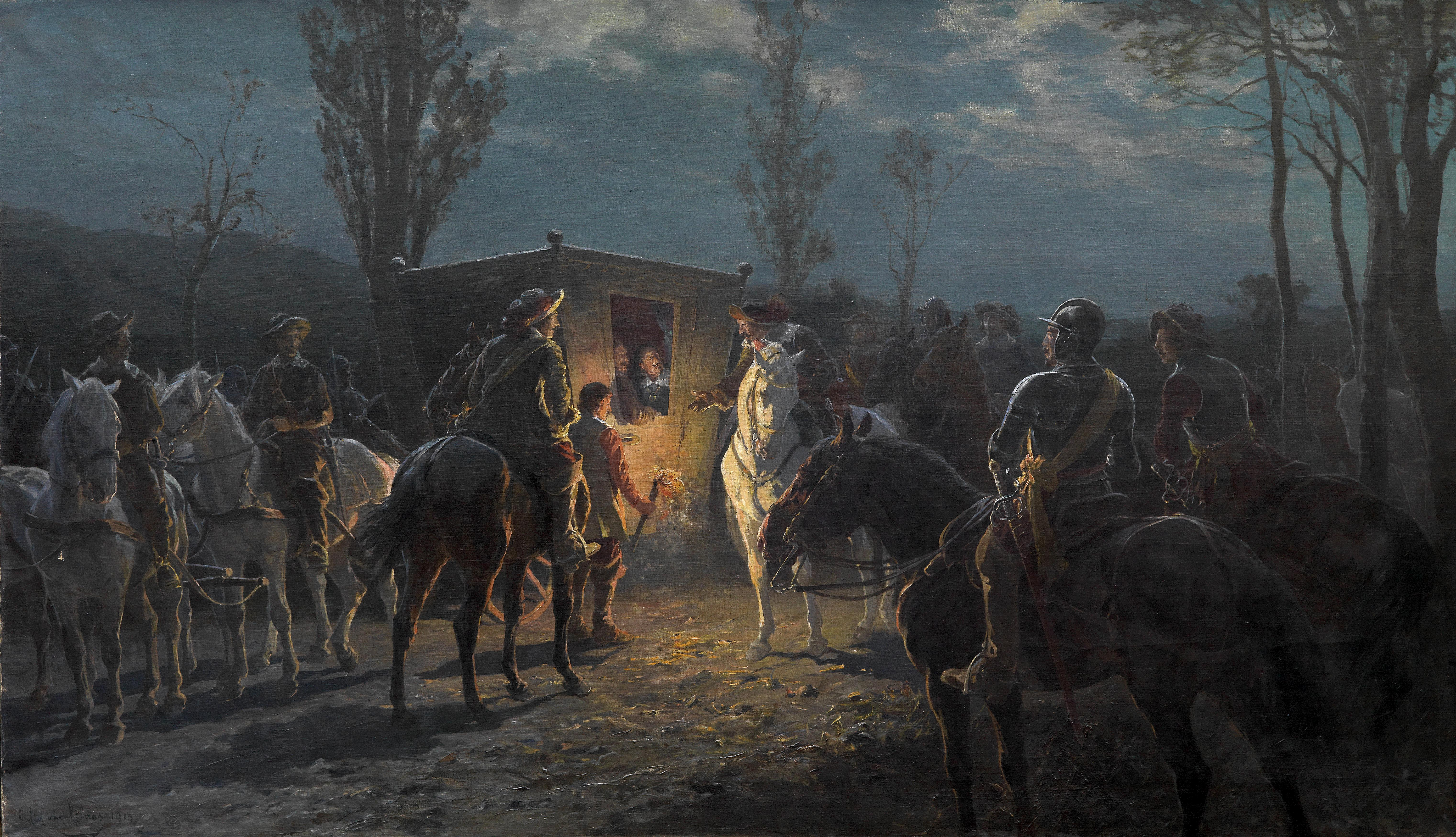 Nachtszene. Berittene halten eine vornehme Kutsche auf